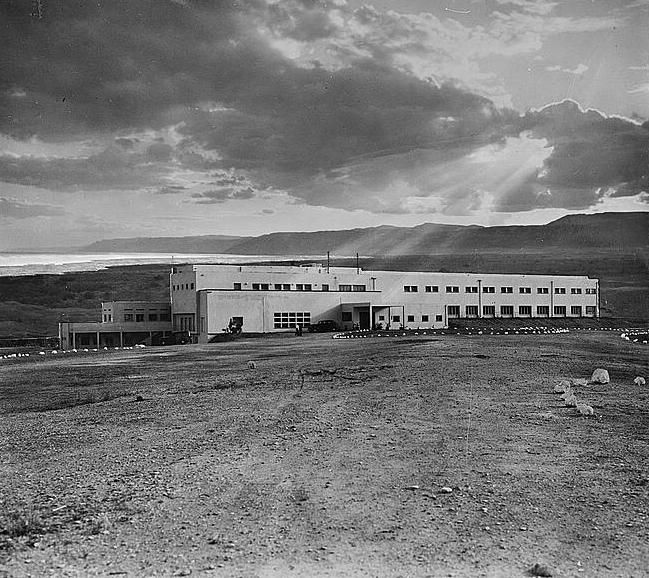 ים המלח, מלון קליה 1934 - 1939